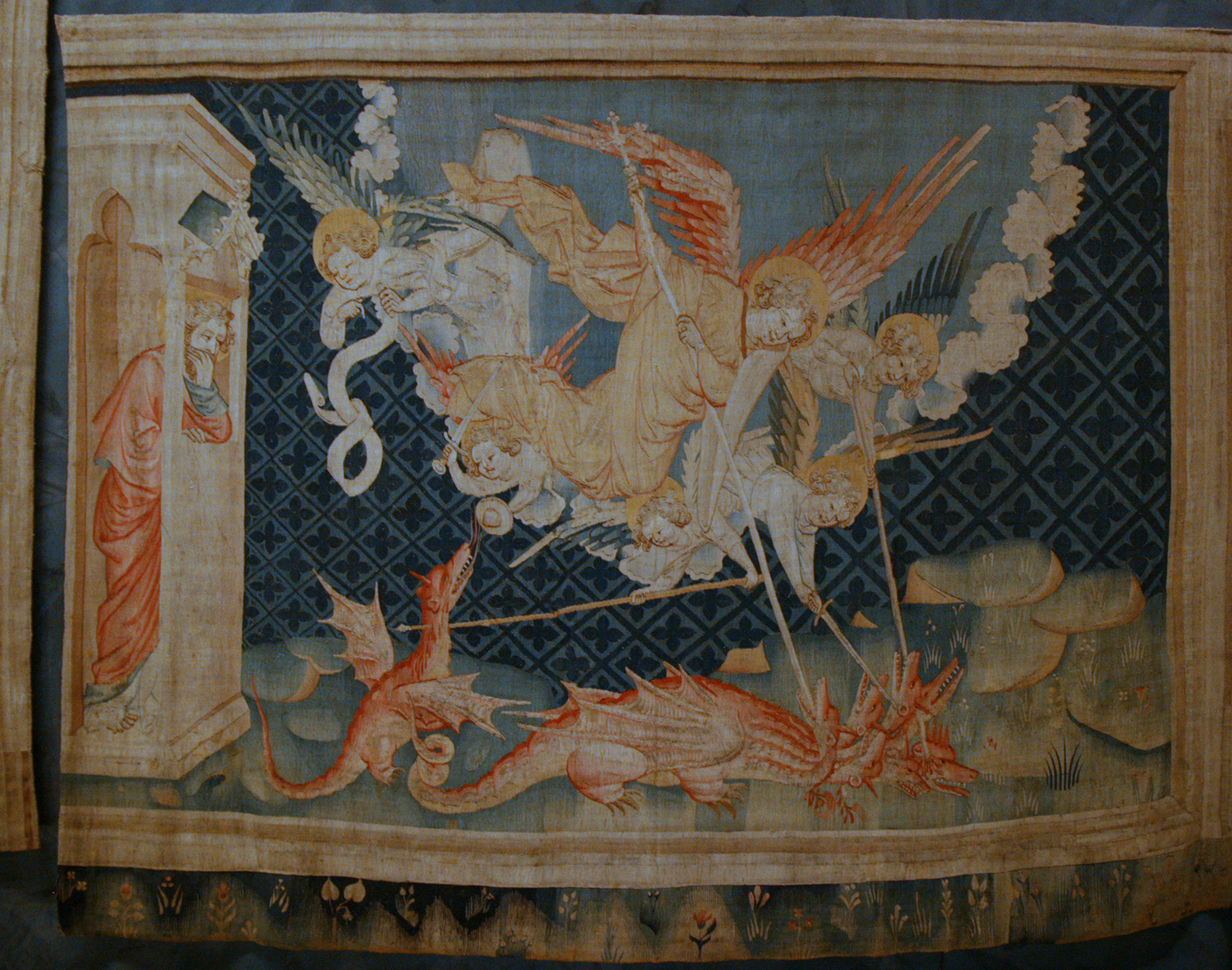 Tenture de l'Apocalypse au château d'Angers